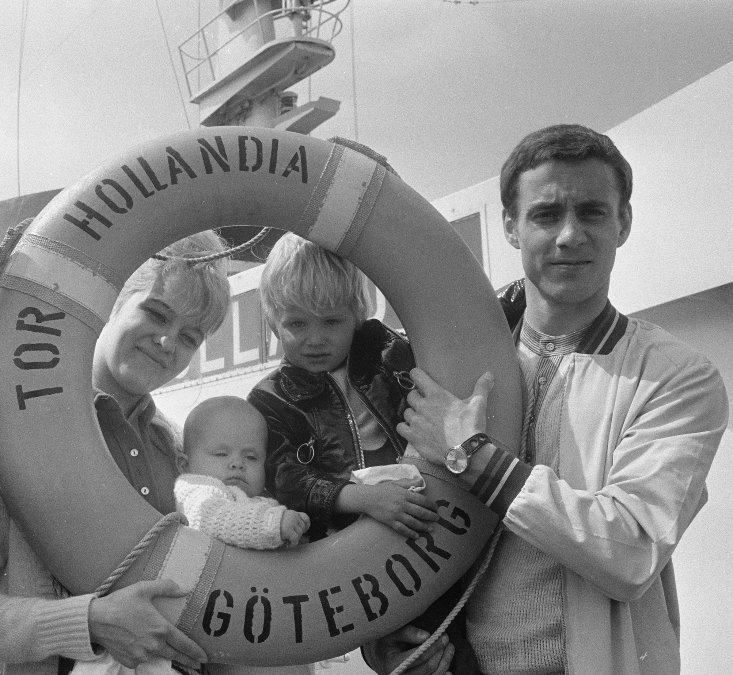 Ove Kindvall vertrekt naar Zweden met echtgenote en kinderen, met schip; Ove Kindvall en echtgenote en kinderen aan boord